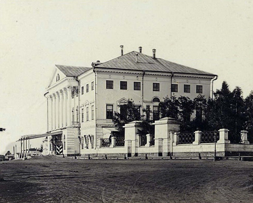 Дом генерал-губернатора (дворец Сибиряковского) в Иркутске